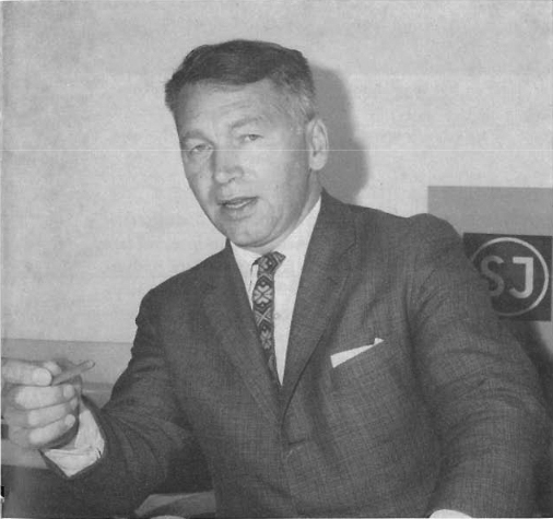 Karl-Axel Bladh